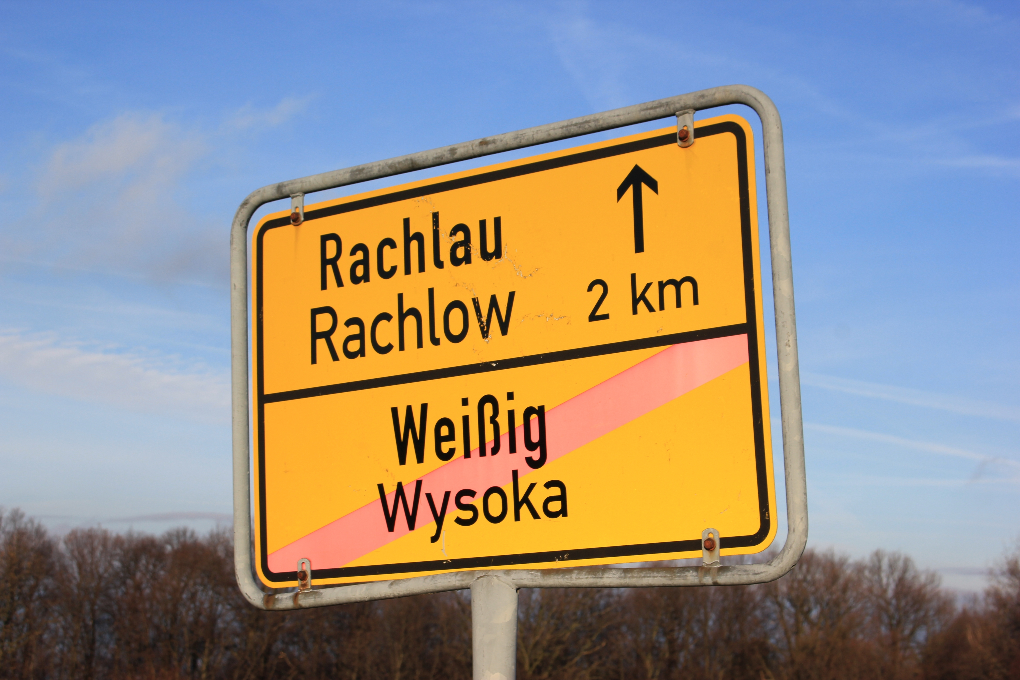 Hornjoserbsce: Wjesna tafla we Wysokej.